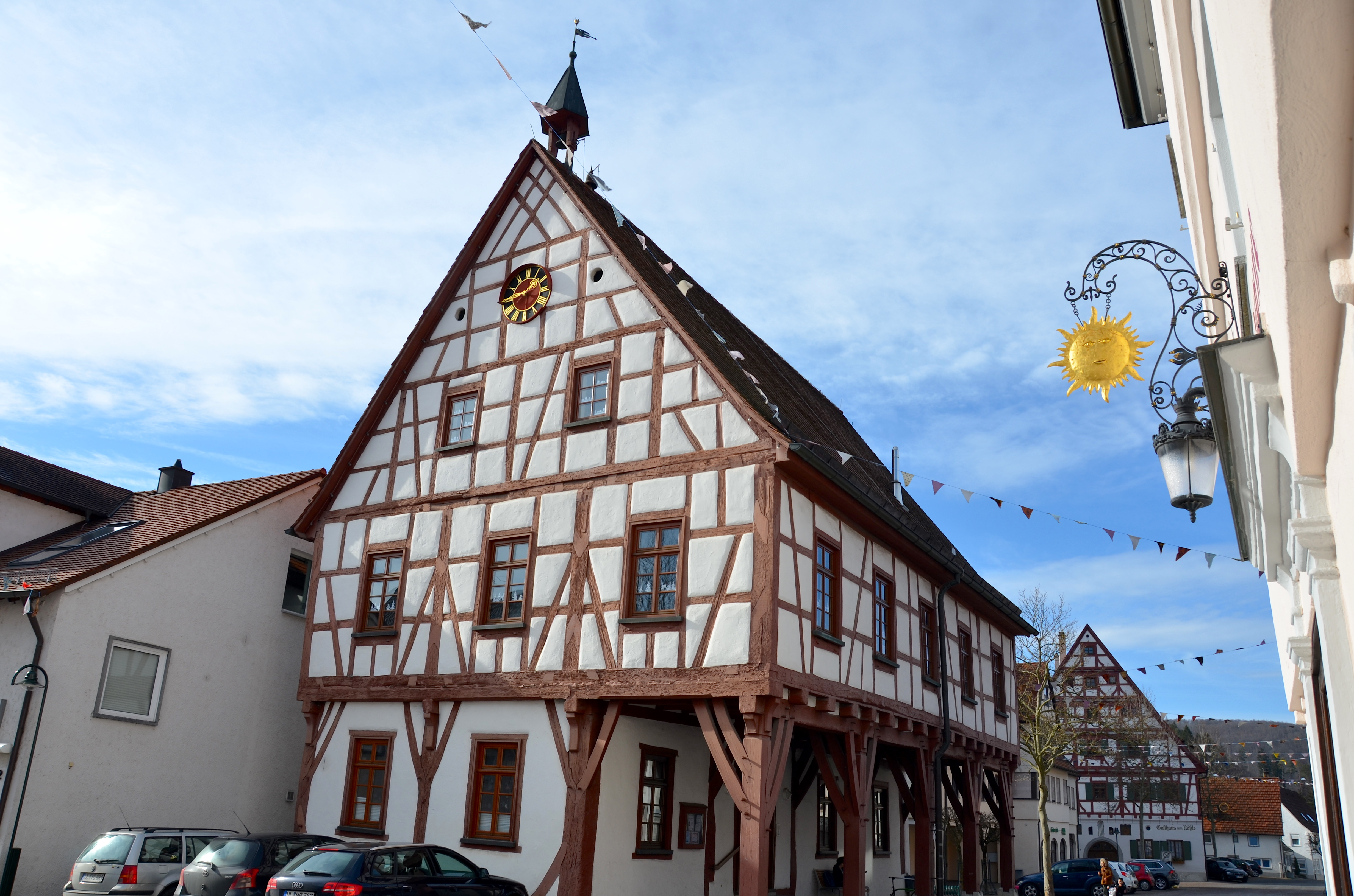 Altes Rathaus in Schelklingen, Baden-Württemberg